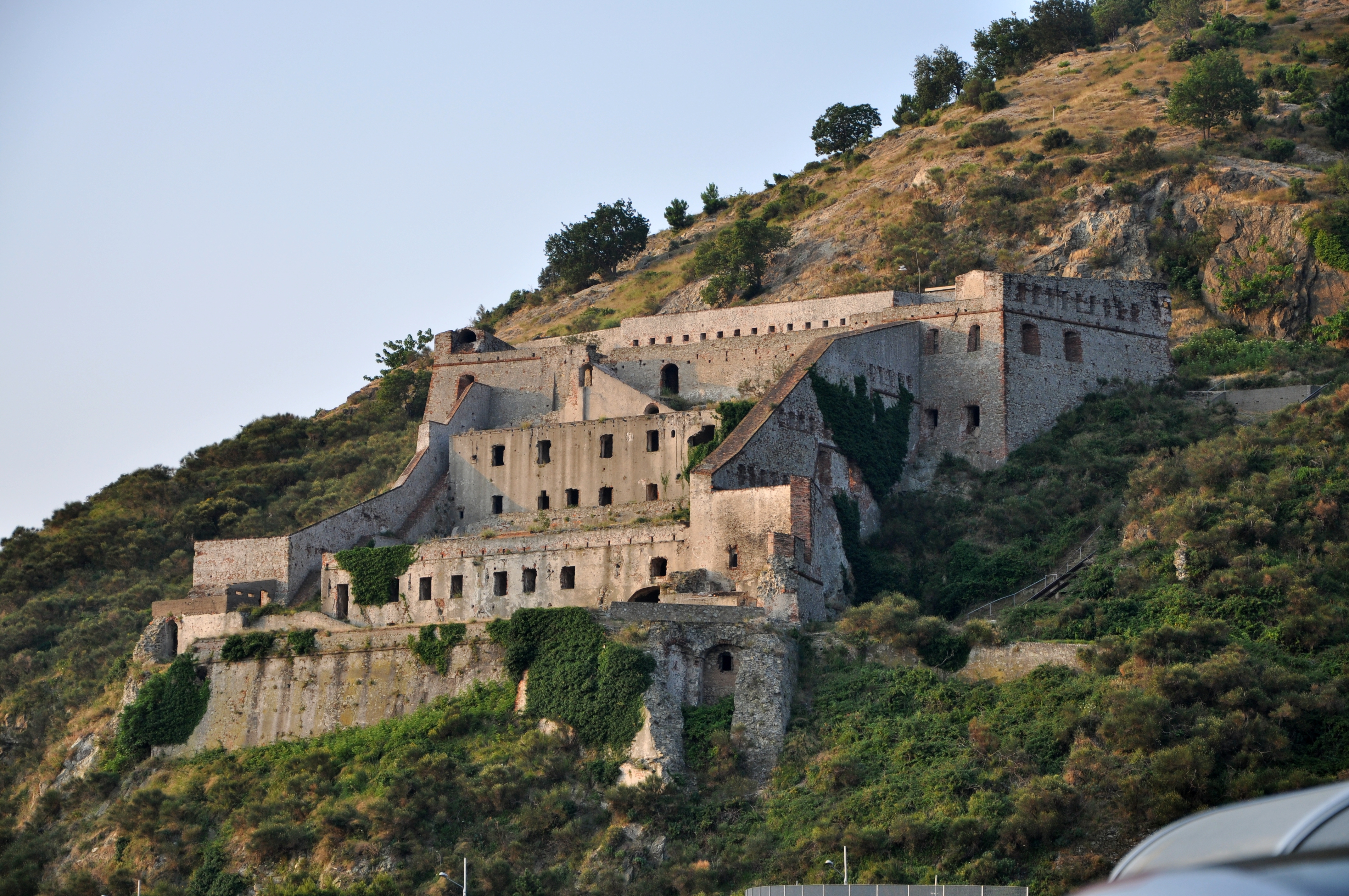 Fort in Vado Ligure